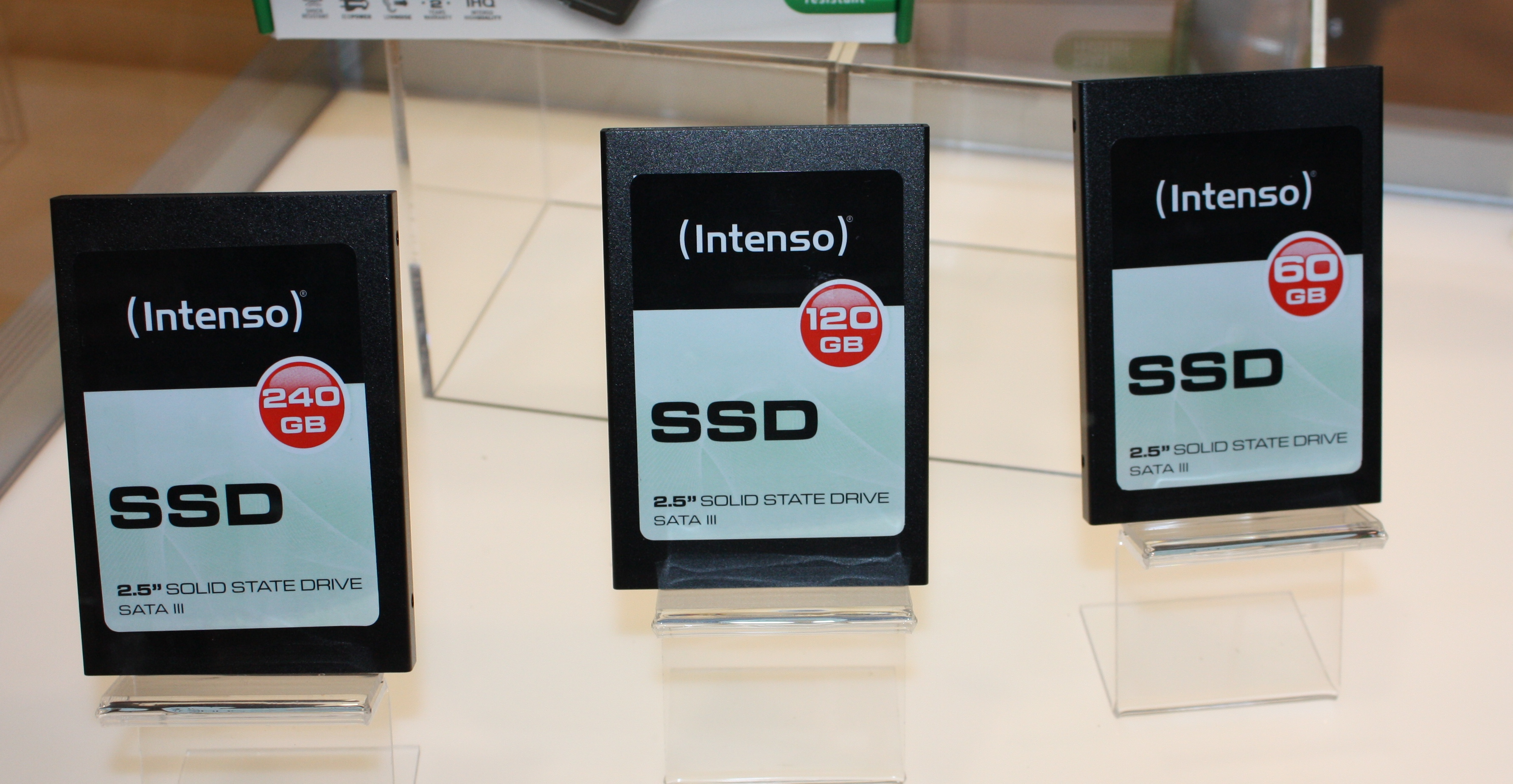 Internationale Funkausstellung 2012